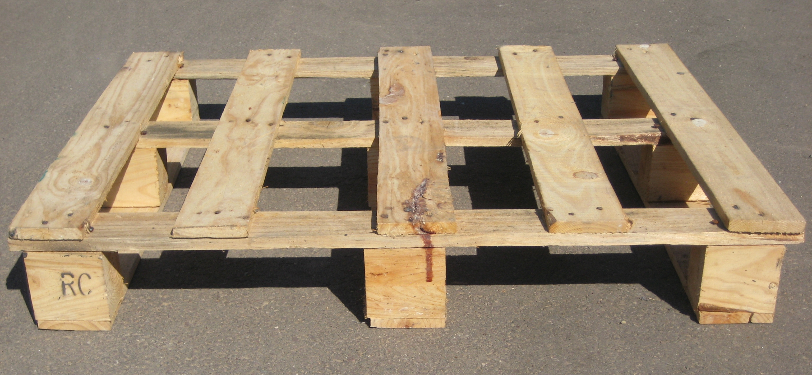 Einwegpalette aus Holz